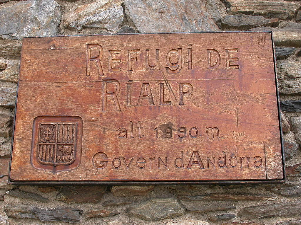 Refuges Andorre